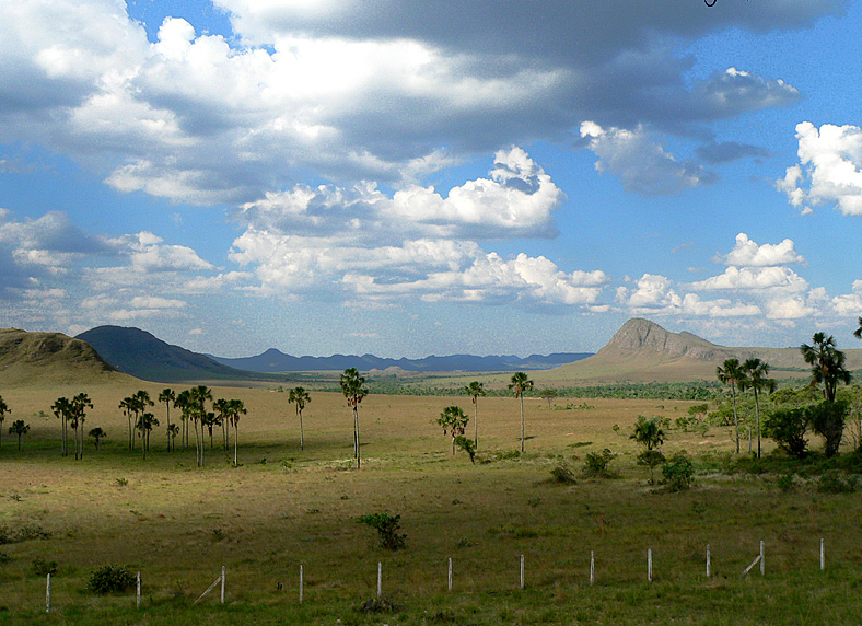 Chapada dos Veadeiros - Jardim de Maytrea by jvc